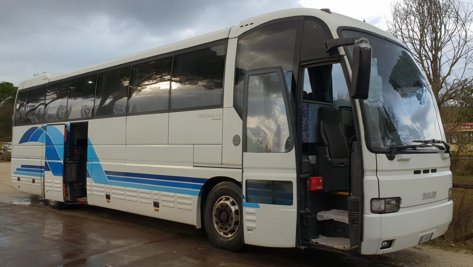 Iveco 380.12.38 HD Euroclass Orlandi del 1995 n.ro 047 preservato da Storicbus-Museo dell'Autobus Italiano